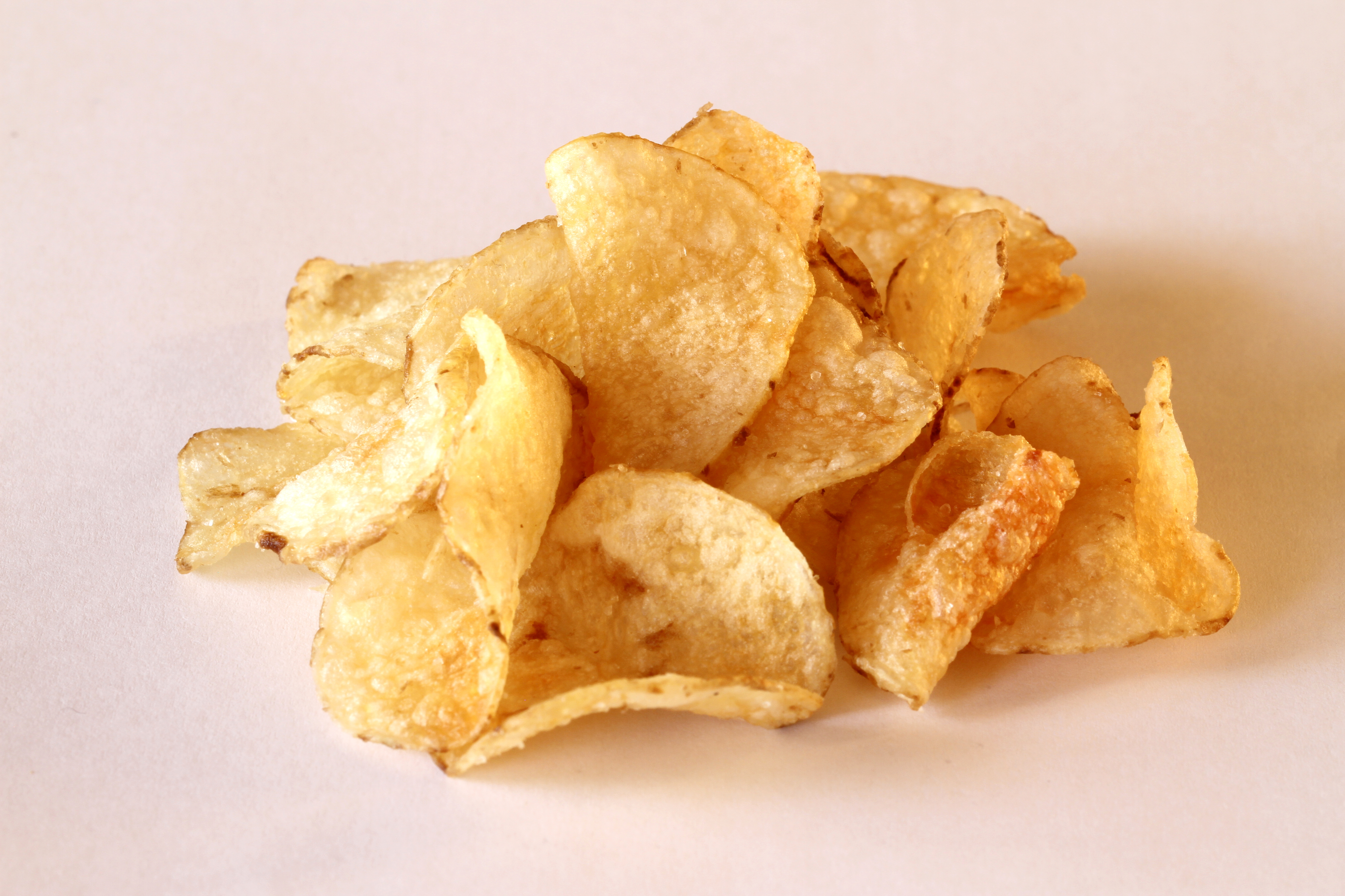 Sørlandschips med havsalt.